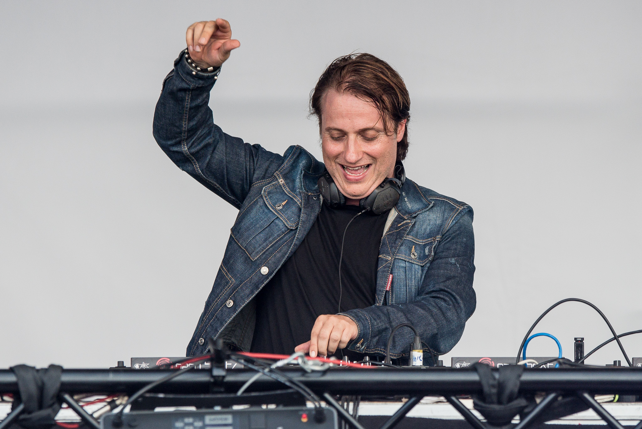 EDX,Festival,Konzert,Livekonzert,Livemusik,Mainstage,Maurizio Colella,Musik,Open Beatz 2016